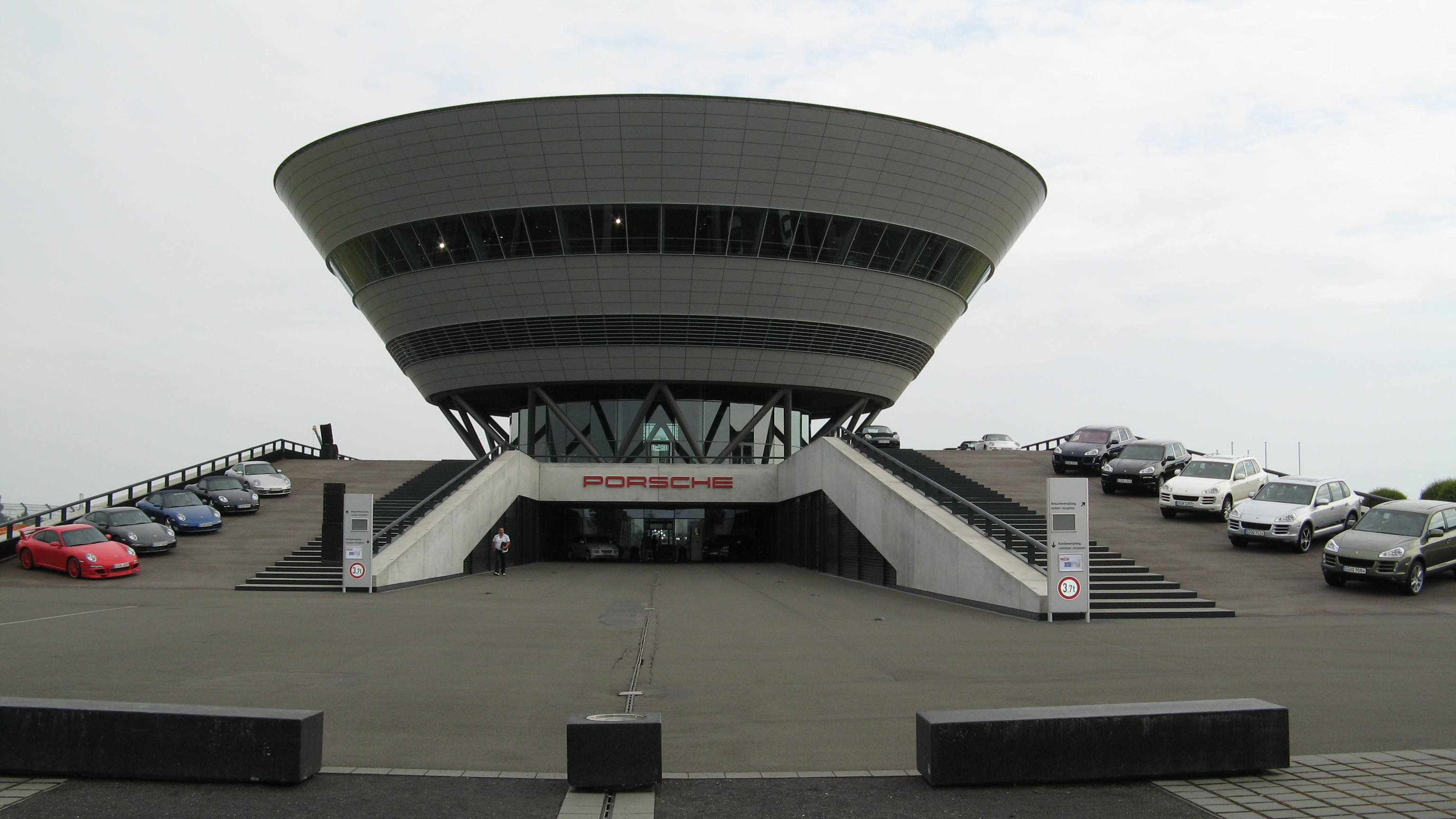 Kundenzentrum von Porsche Leipzig